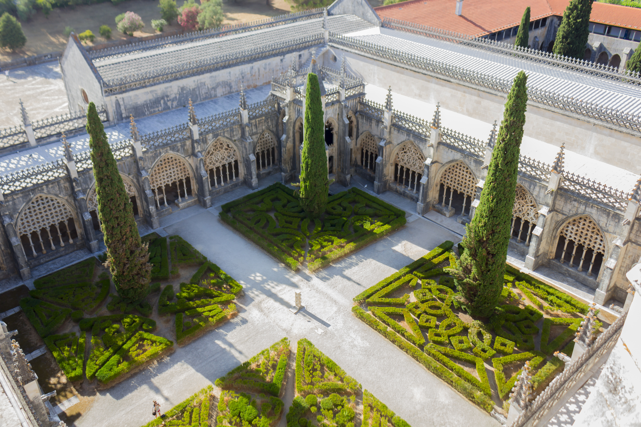 Batalha-Monastery-18